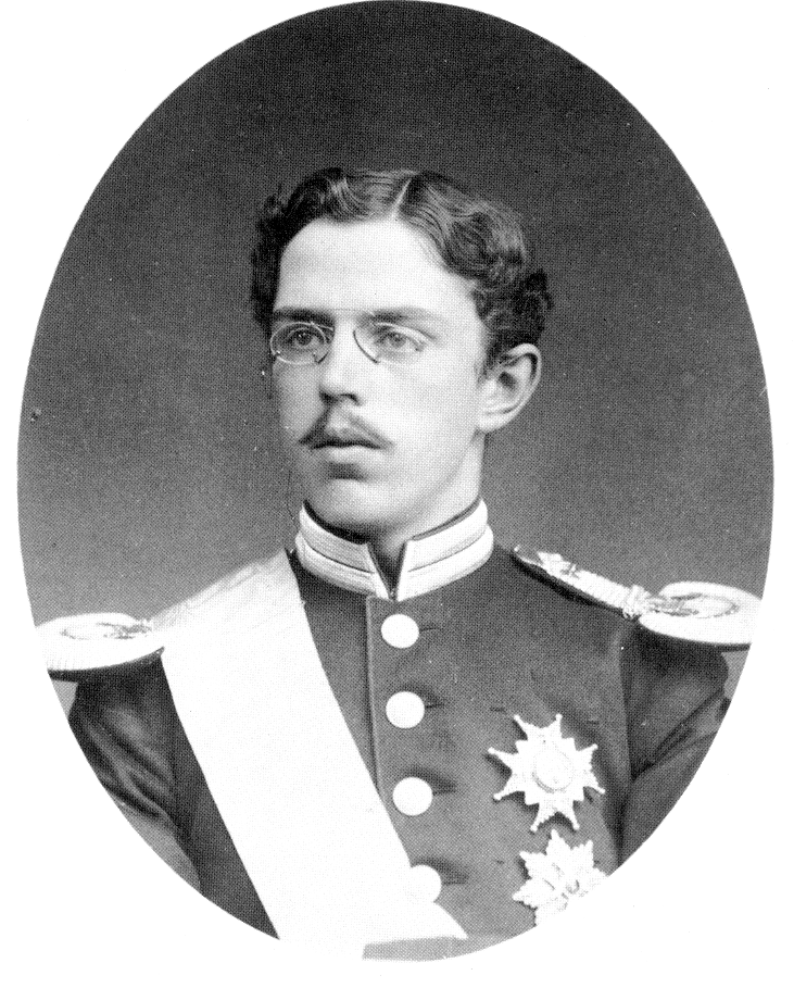 King Gustav V of Sweden.